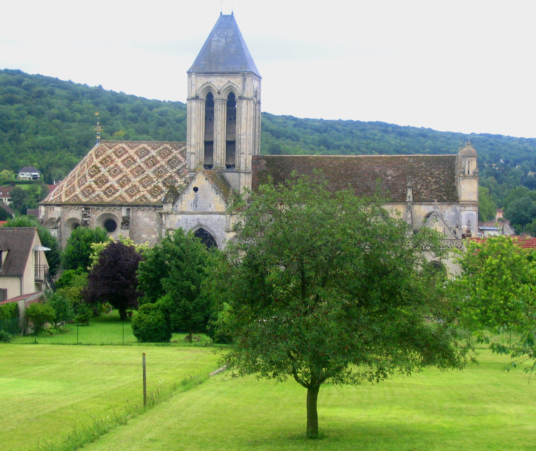 Eglise de Vetheuil, Val d'Oise, France